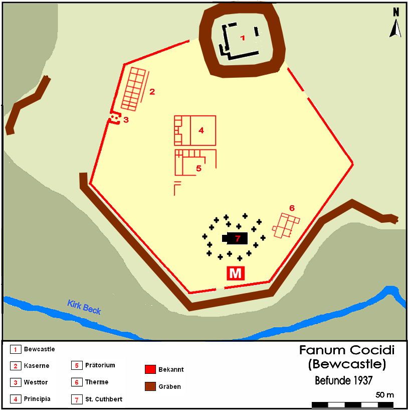 Befundplan der Ausgrabungen auf dem Areal des römischen Kastells Fanum Cocidi/Bewcastle (GB), Stand 1937, Zustand im 3. Jahrhundert n.Chr.